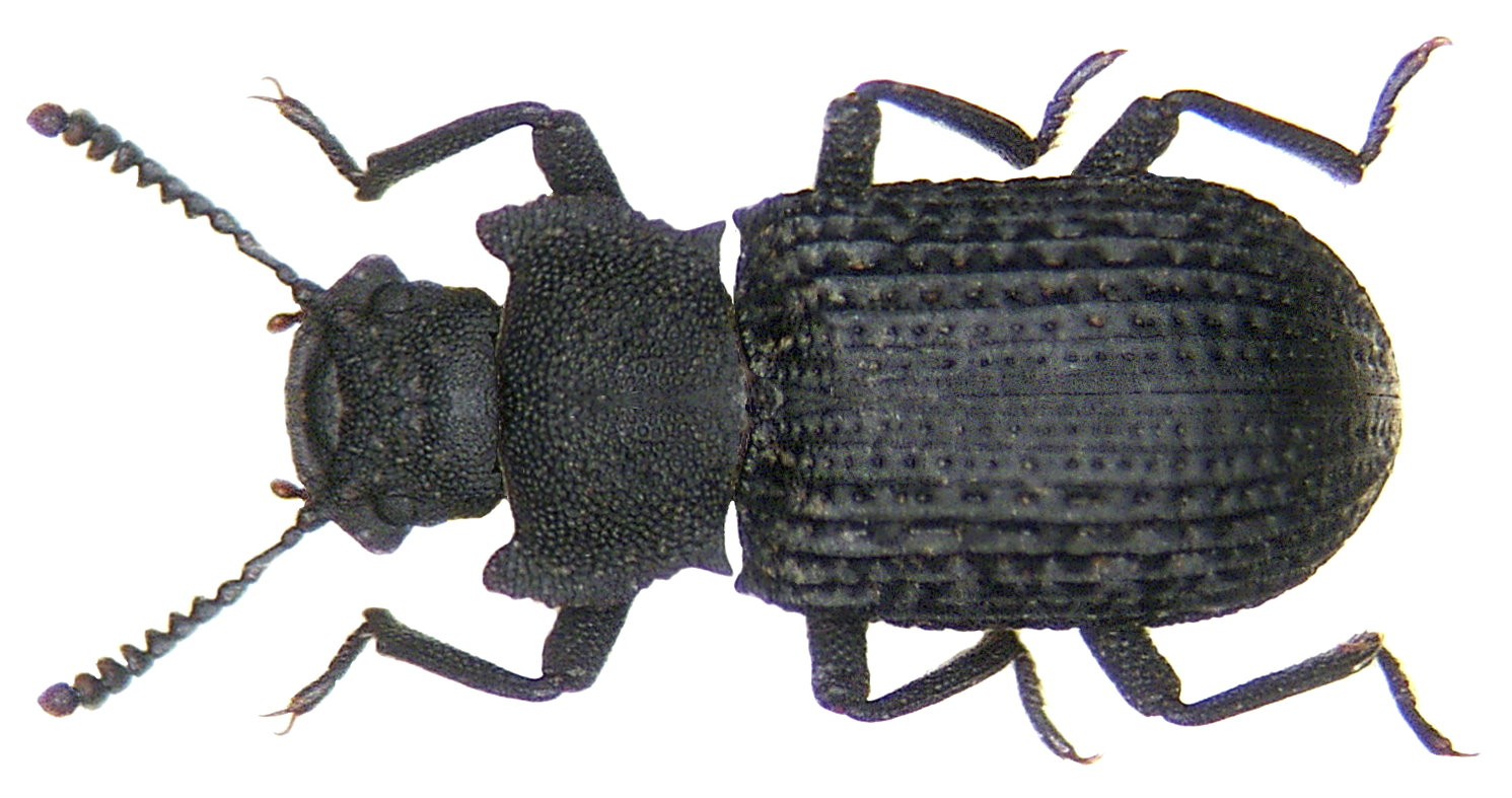 Familie: Tenebrionidae Groesse: 6-7 mm Verbreitung: Europa Fundort: Austria, Tirol, St. Ulrich a. Pillersee leg.det. U.Schmidt, 2006 Photo: U.Schmidt, 2006